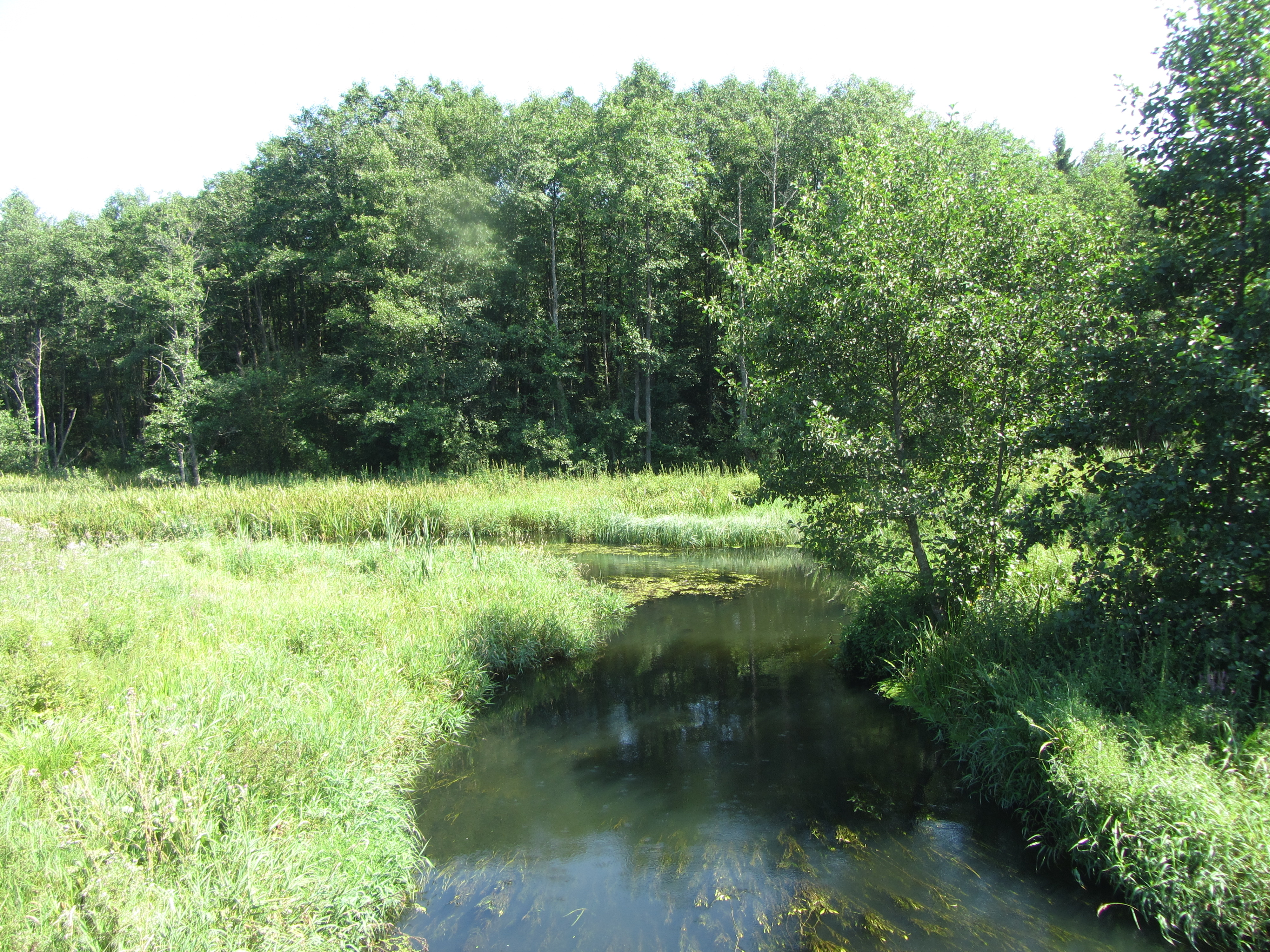 Gudeliai, Lithuania